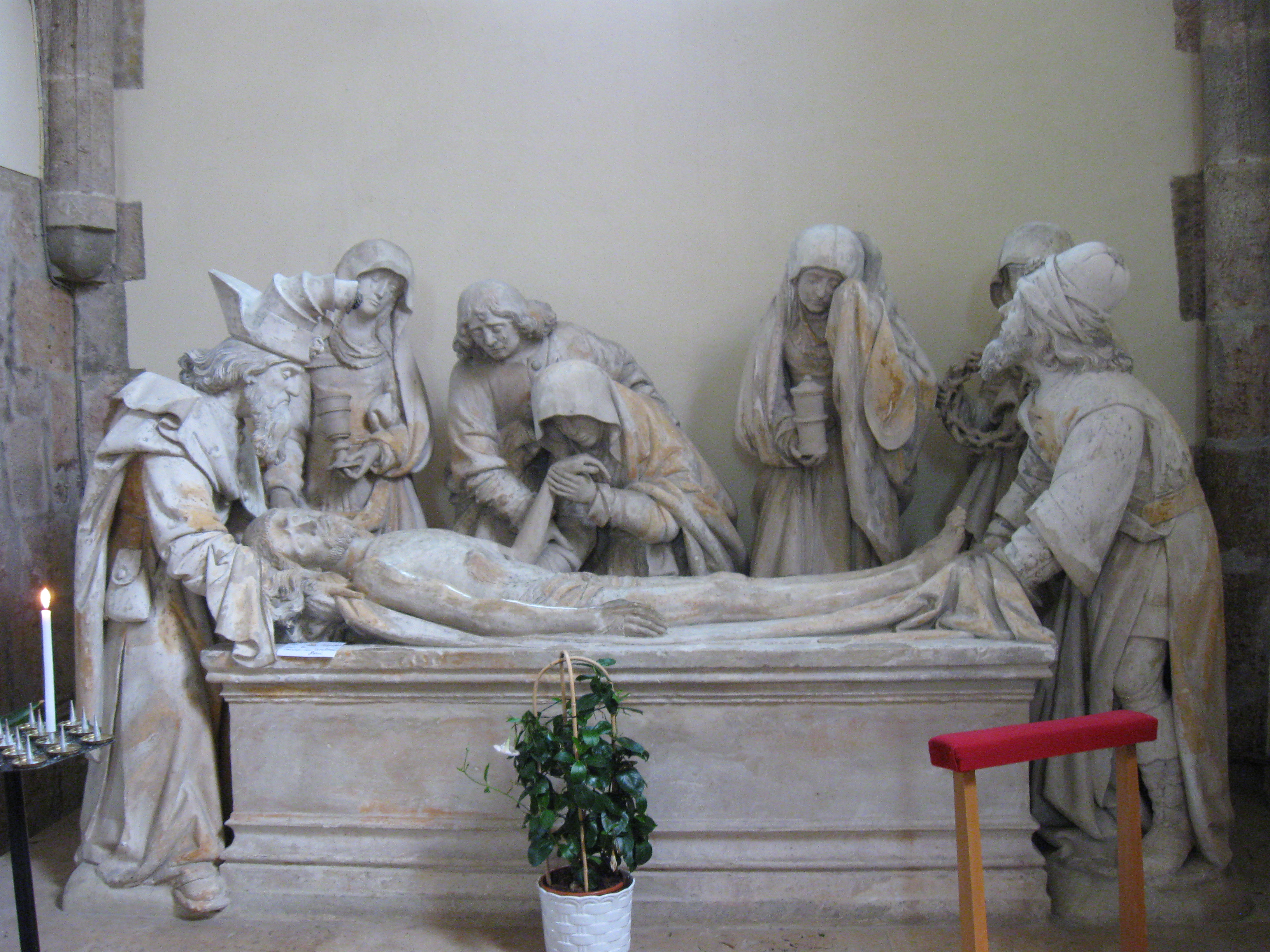 La Mise au Tombeau (groupe sculpté, XVI e siècle), église Saint-Martin de Malesherbes (département du Loiret , région Centre).